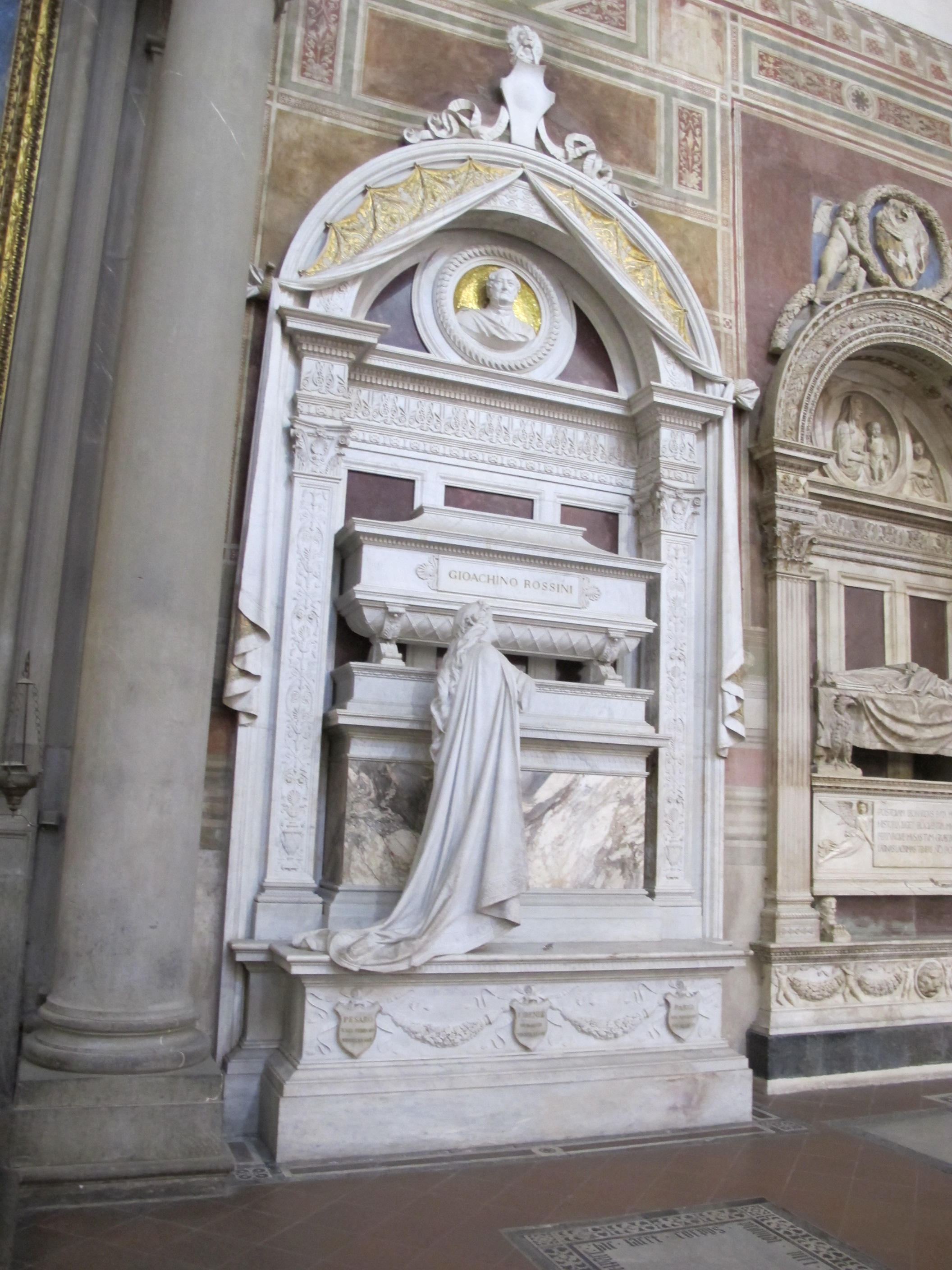 S. croce, tomba gioacchino rossini